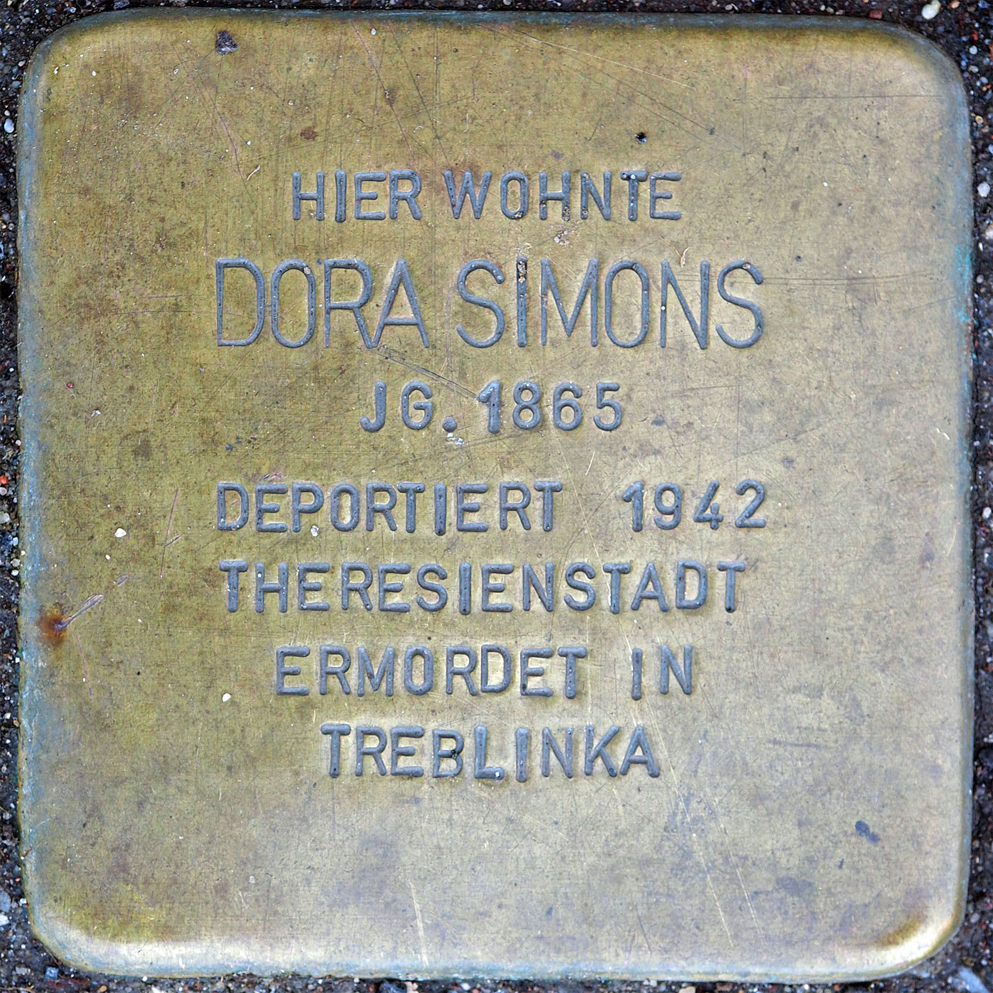 Stolpersteine MG: Simons, Dora